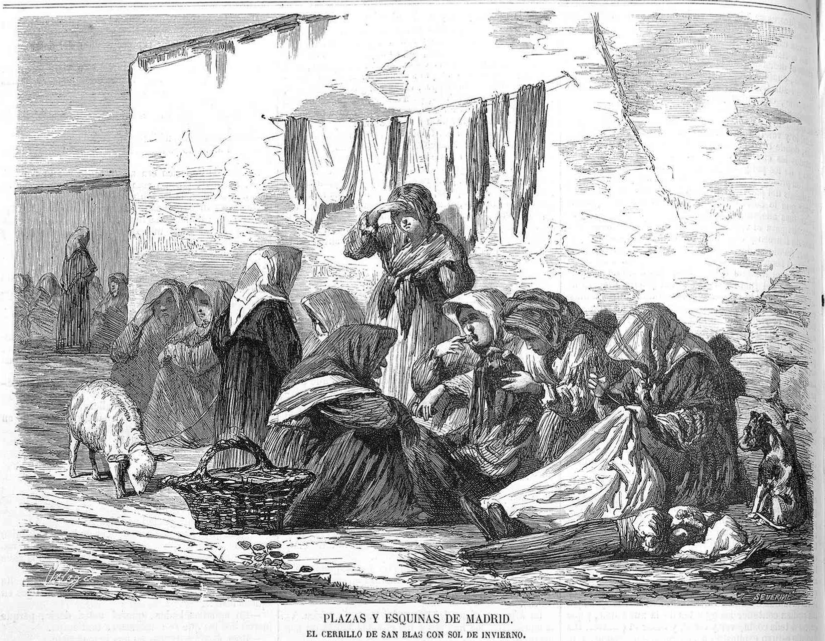 Plazas y esquinas de Madrid. El cerrillo de San Blas con sol de invierno.